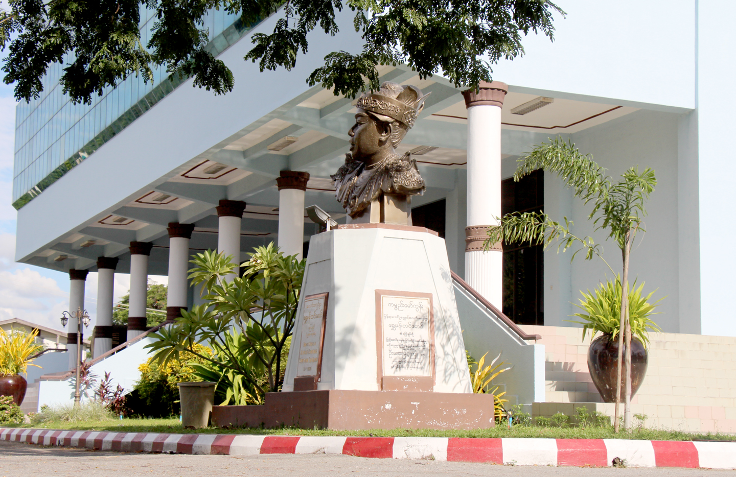 မြန်မာဘာသာ: မန္တလေး အမျိုးသား ကဇာတ်ရုံ ရှေ့ရှိ ရွှေမန်းတင်မောင် ရုပ်ထု